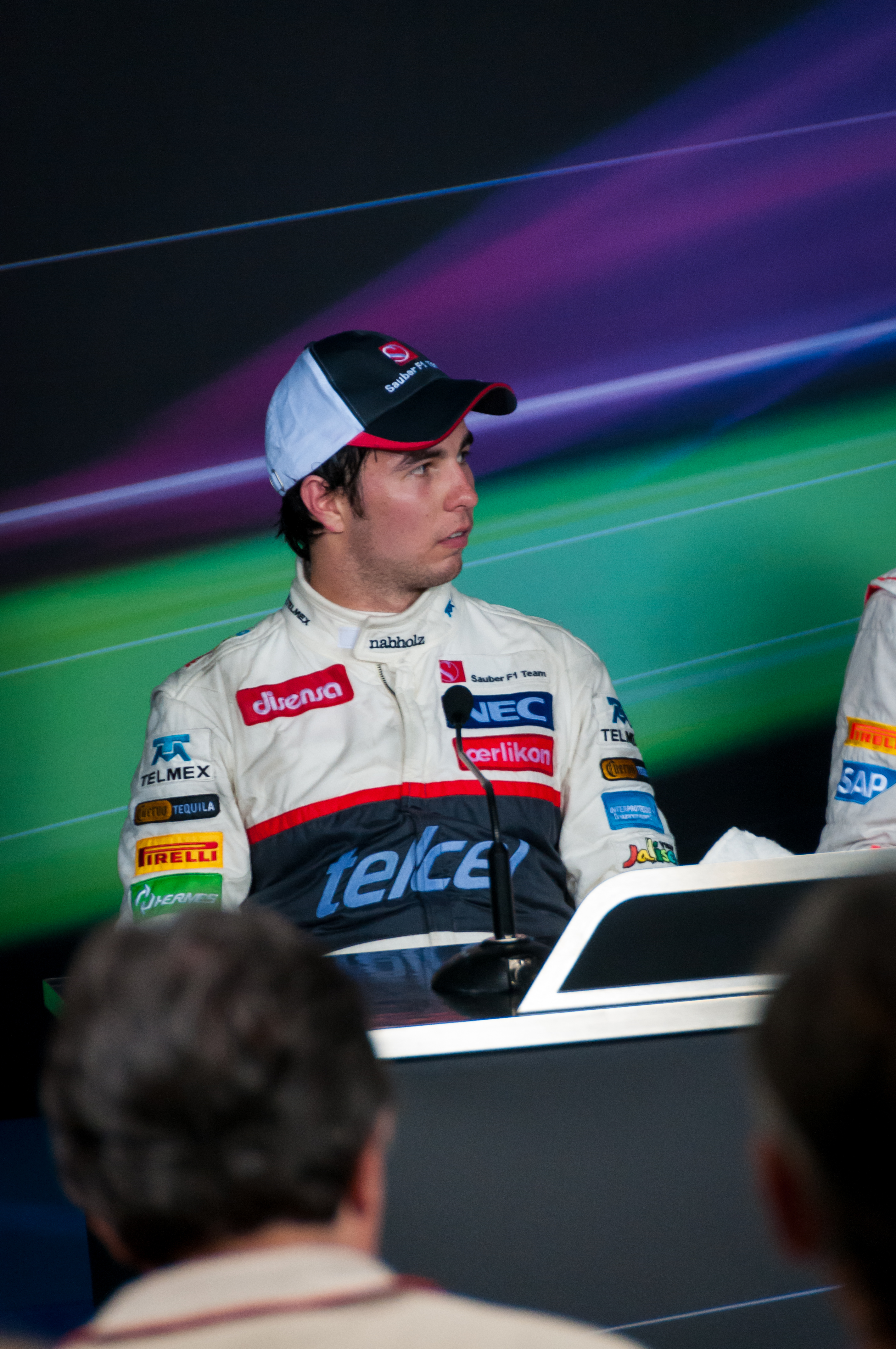 Sergio Pérez Monza 2012